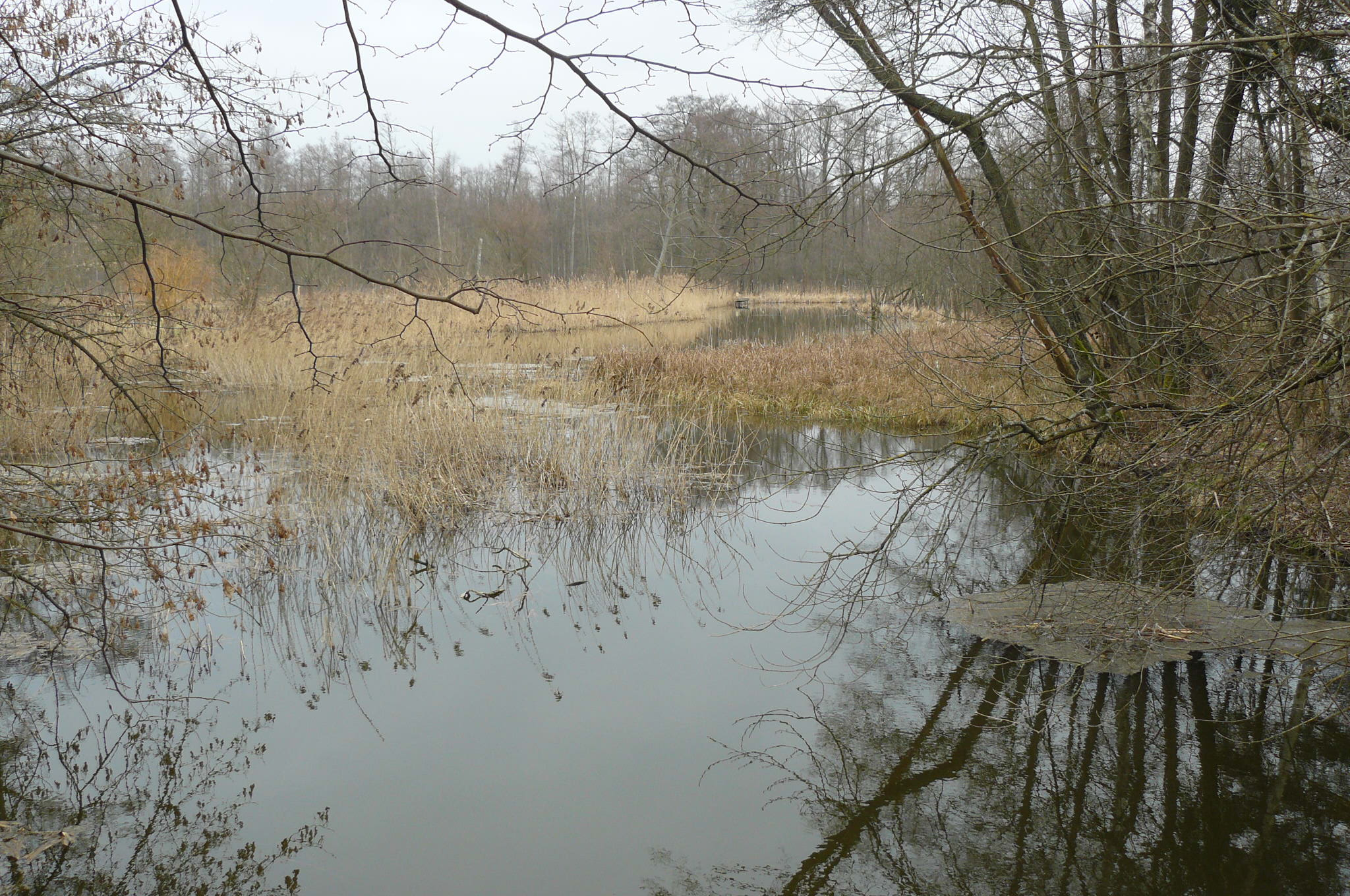 Rzeka Miała.